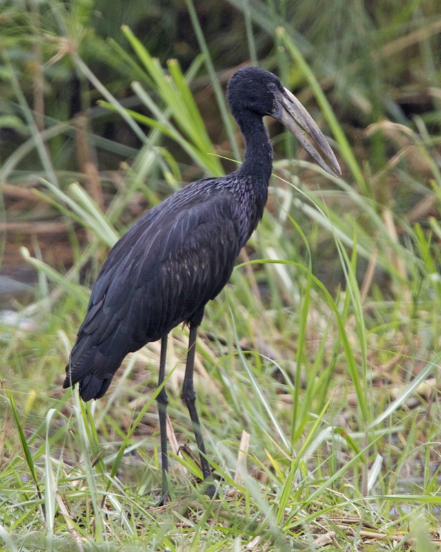 African Openbill Anastomus lamelligerus ssp Anastomus lamelligerus lamelligerus Akagera National Park, Rwanda 15th. August 2009 Distribution: ssp 690V1473.jpg